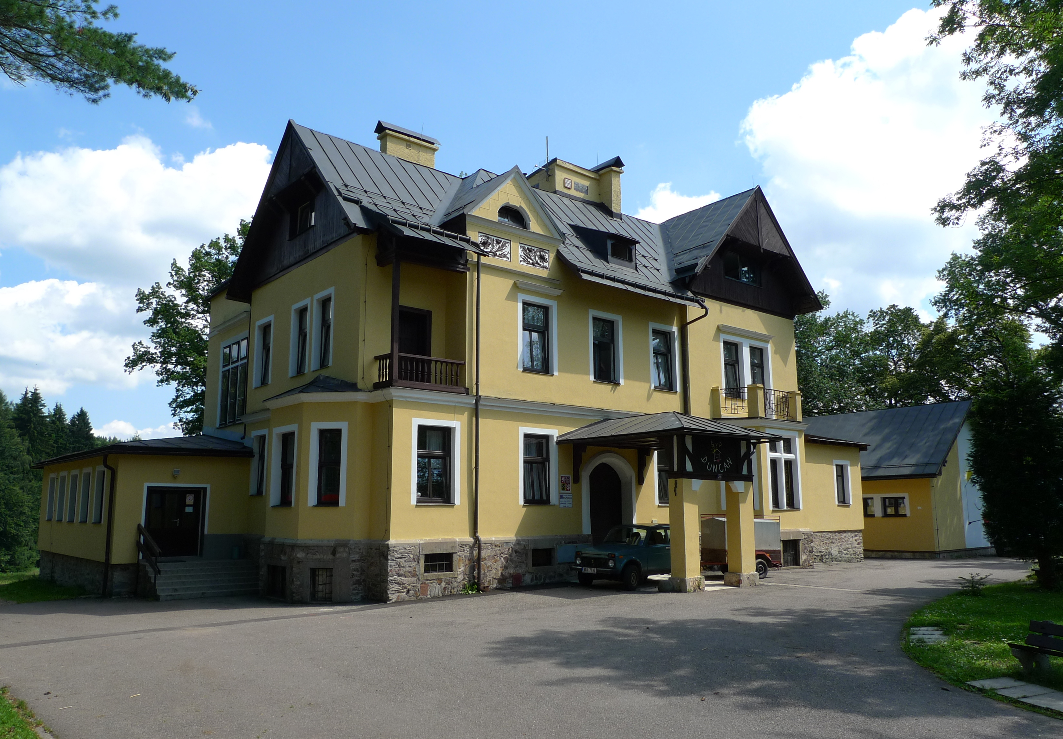 Vila Duncan - škola v přírodě v Janských Lázních